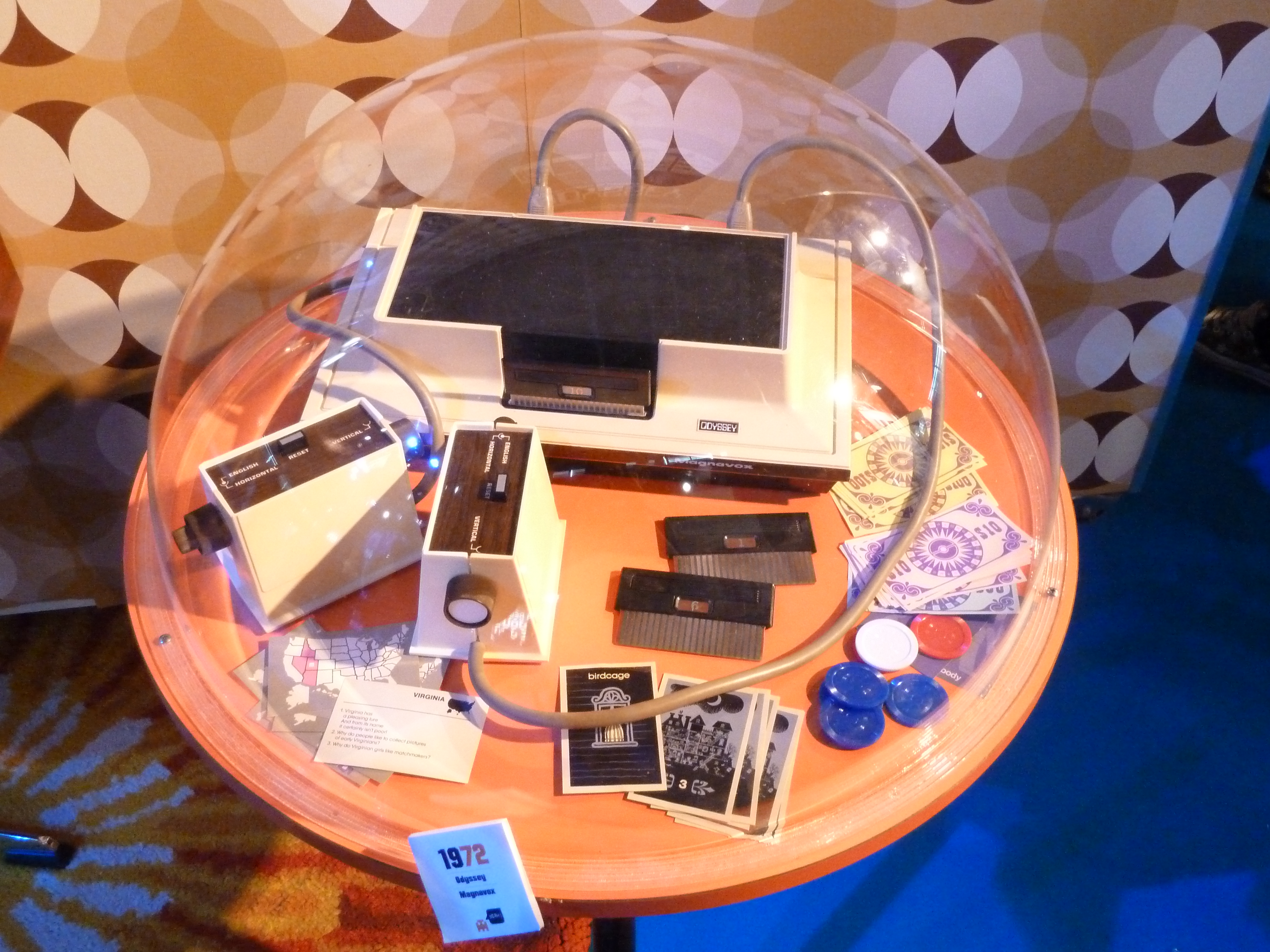 Magnavox Odyssey présentée au Festival du Jeu Vidéo par le musée du jeu vidéo